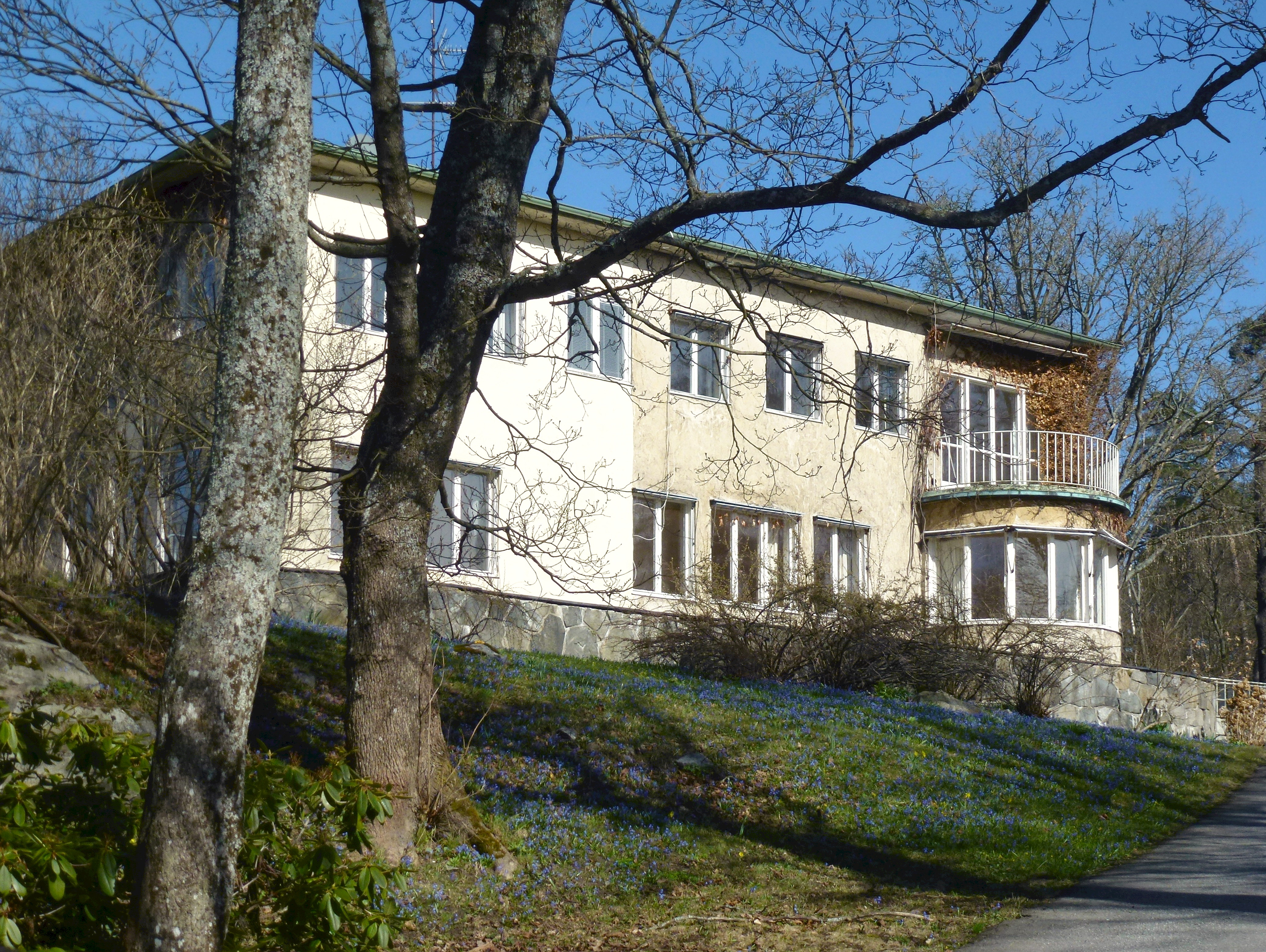 Villa Solbacken vid Djurgårdsbrunnskanalen